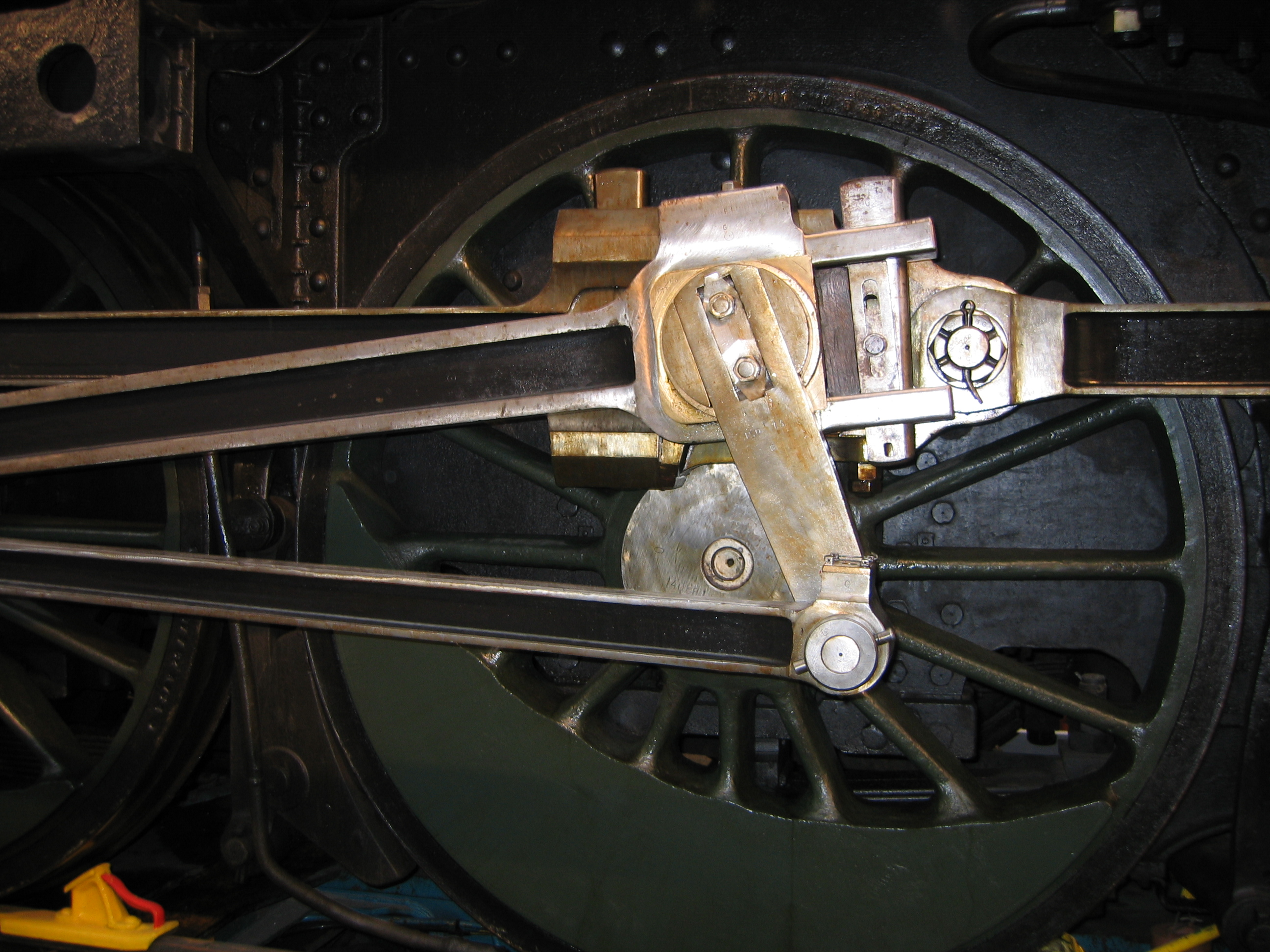 Locomotive 150P13 détail